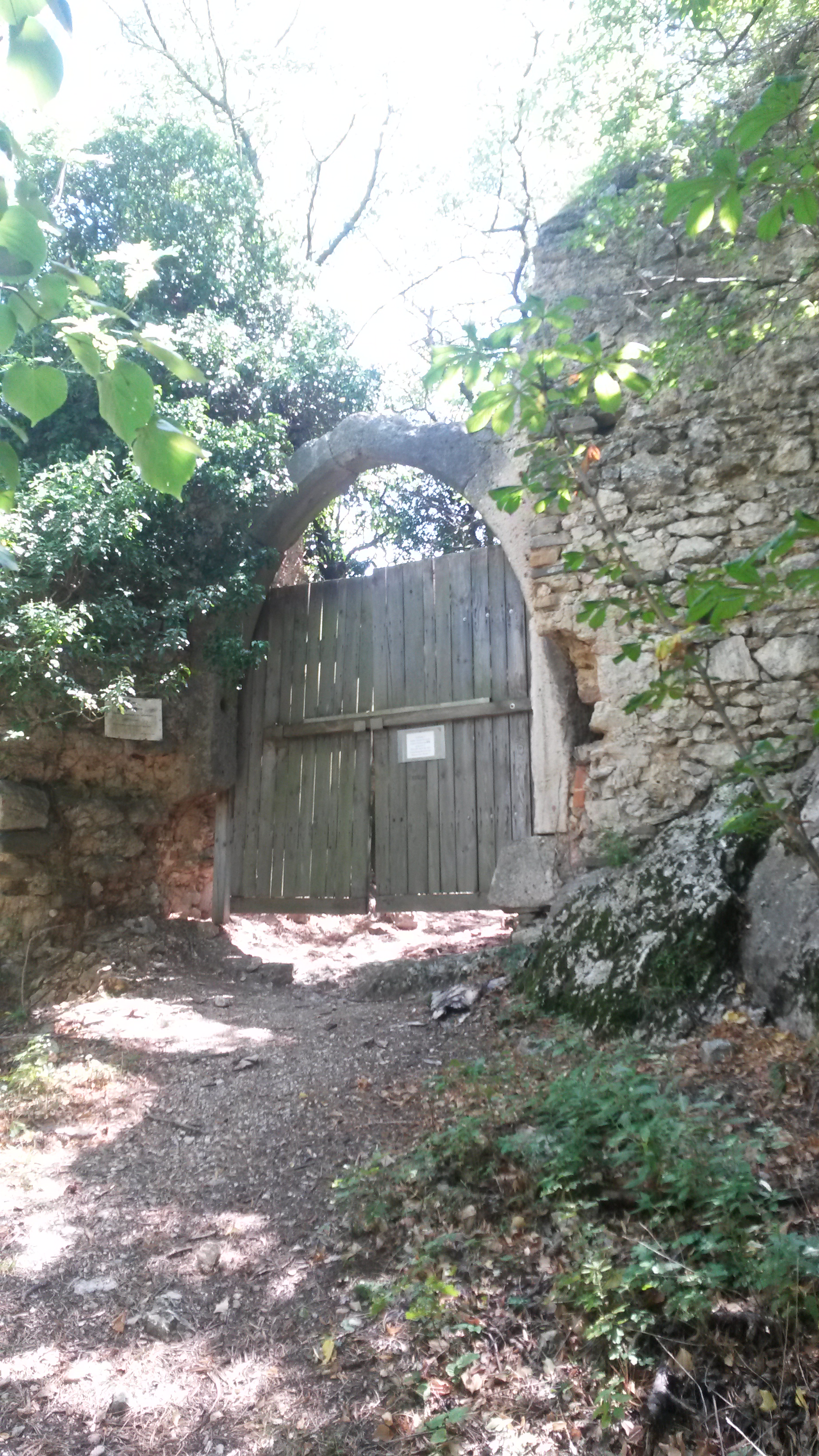 Burgruine Emmerberg (NÖ), Tor I.